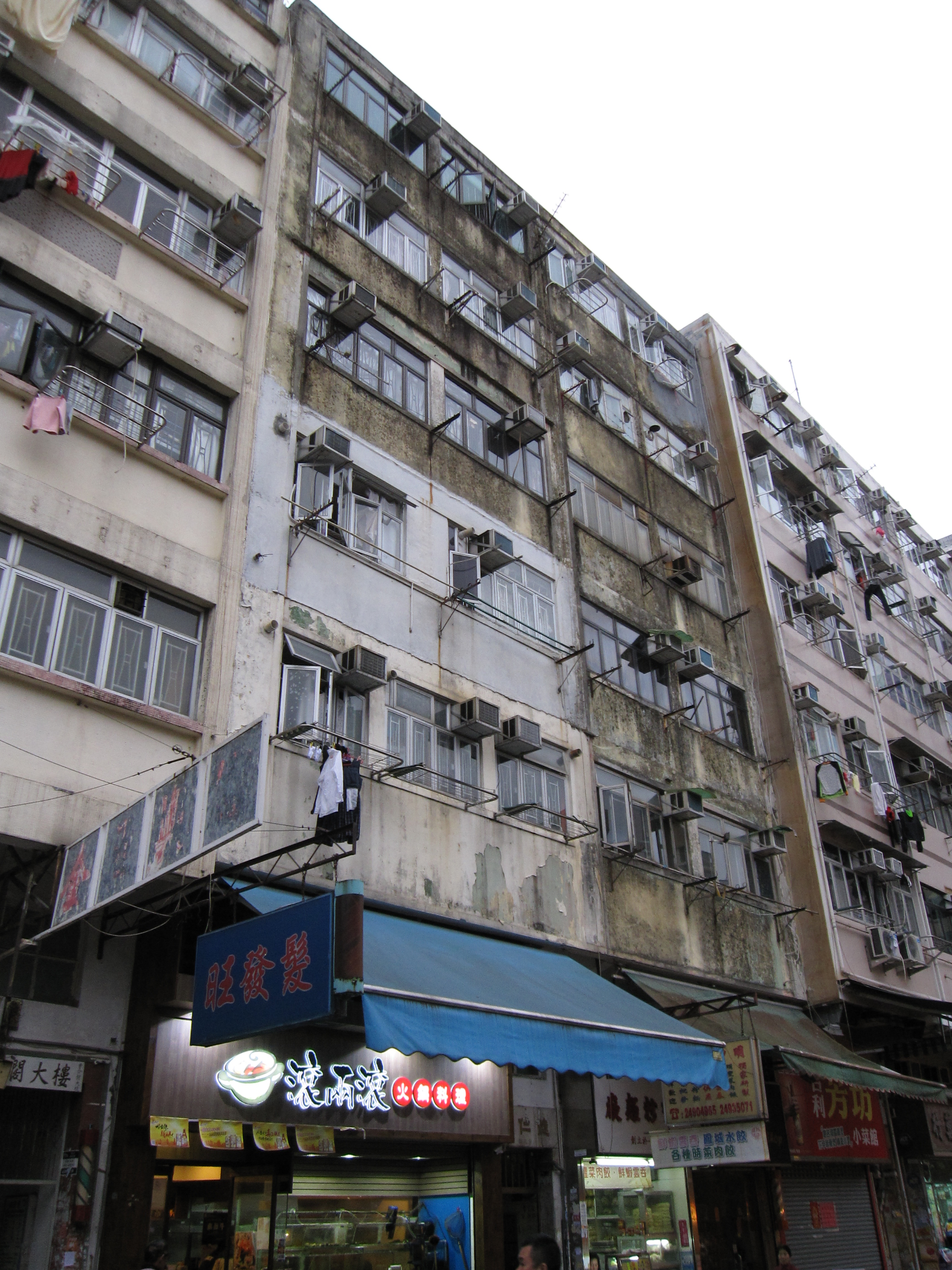 中文（香港）: 德仁樓第三期。